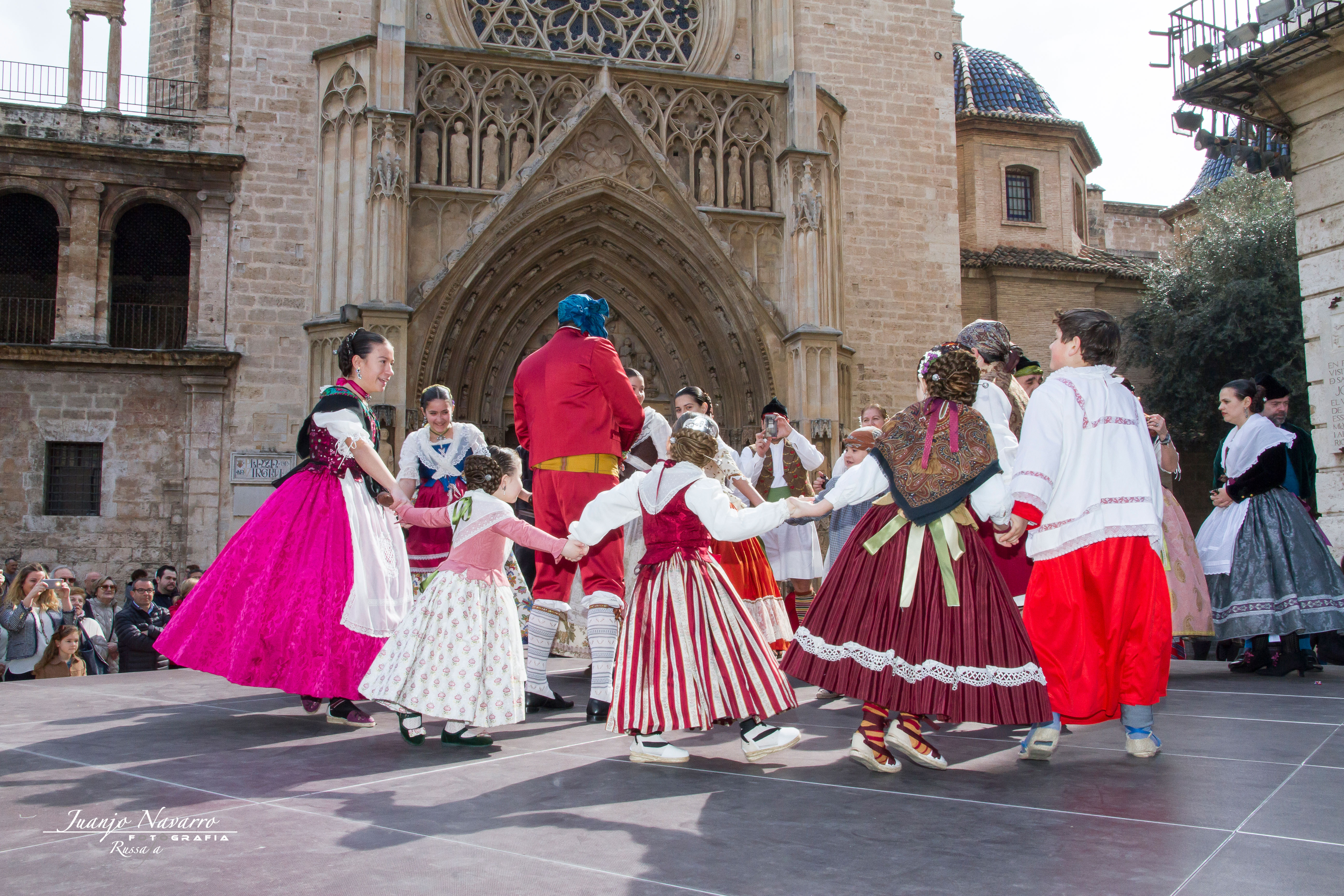 La falla Tio Pep representa un típic bateig valencià al festival Balls al carrer, en els balls que es ballaven a l'eixir de la catedral, convidant als assistents a dolços i mistela. This is a photography of a Folklore festival in Spain (Wikidata id Q1143768).